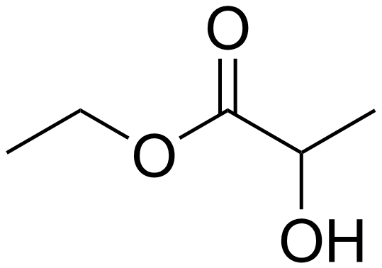 Ethyl lactate (Chemical Structure)